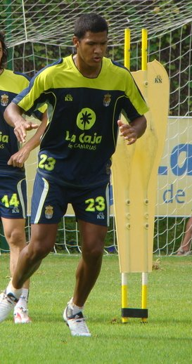 Salomón Rondón